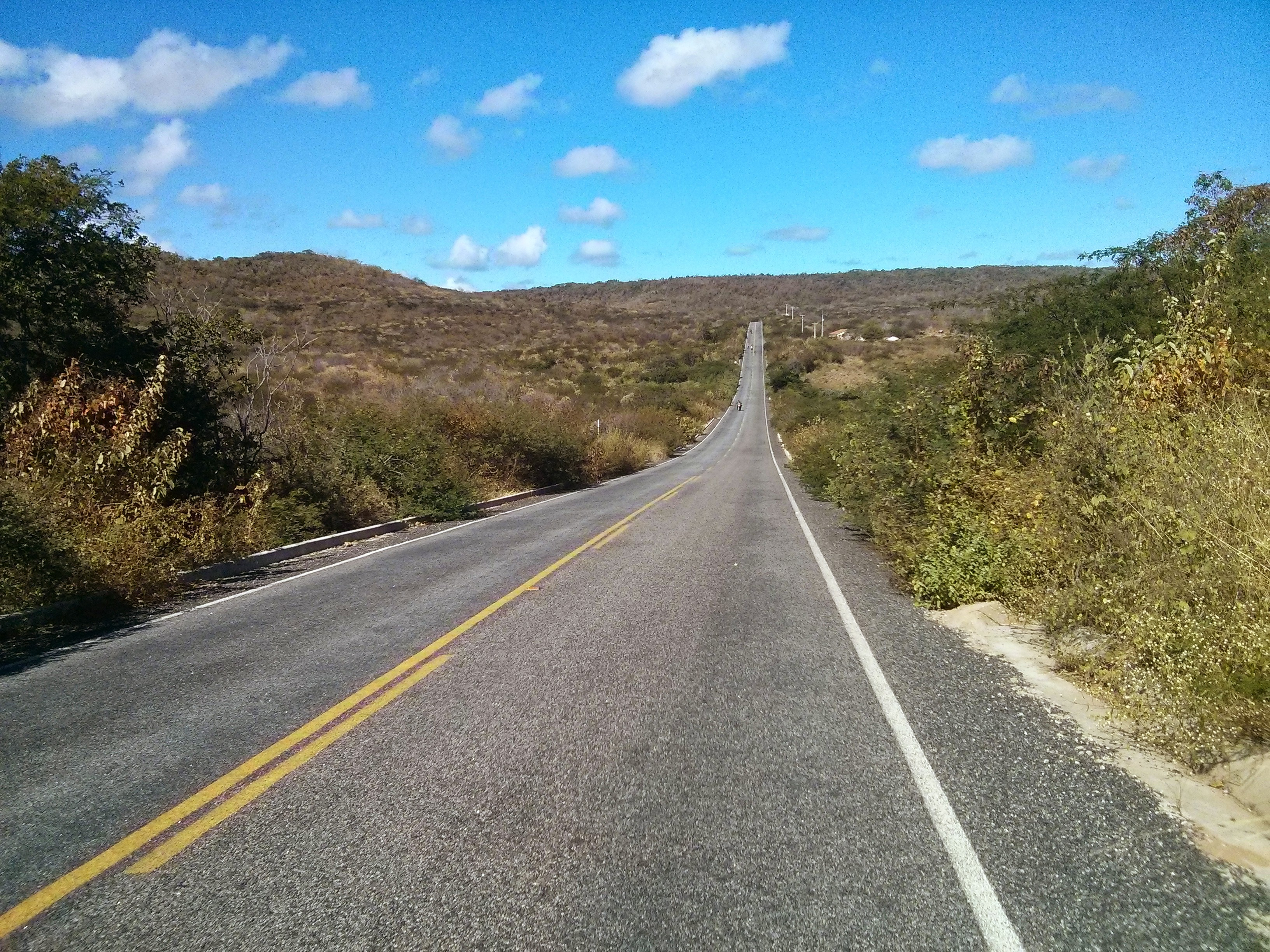 Rodovia PB-306 Paraíba Brasil em 13 de Agosto de 2014